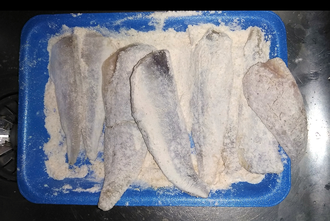 Filetti di gallinella (Chelidonichthys lucerna) inafinati prima della cottura